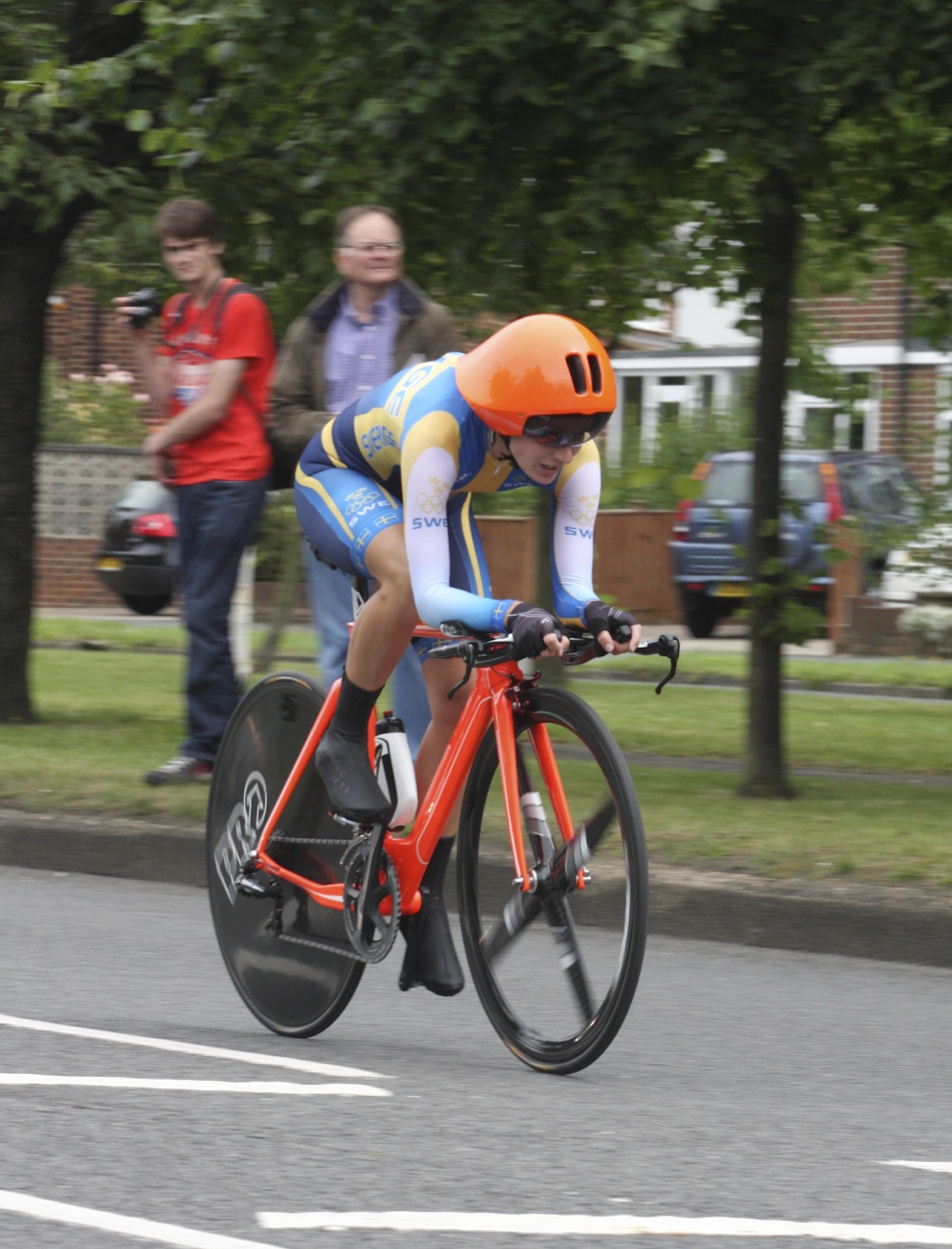 Emma Johansson SWE